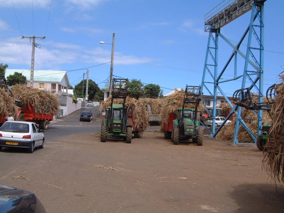 Je suis l'auteur de cette photo prise en Nov.2005